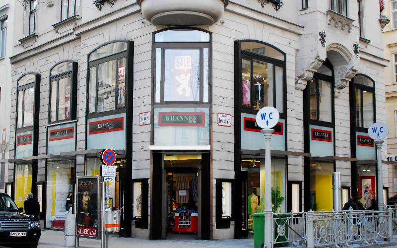 Geschäft Johann Kranner & Söhne im 1. Wiener Gemeindebezirk Bognergasse - Irisgasse